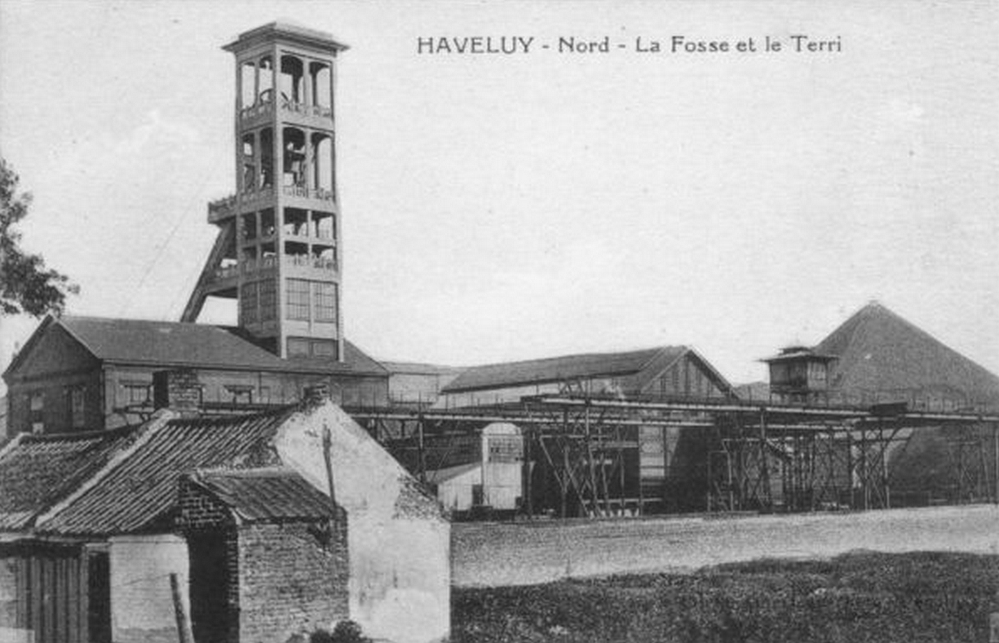 La fosse d'Haveluy de la Compagnie des mines d'Anzin était un charbonnage constitué d'un seul puits situé à Haveluy, Nord, Nord-Pas-de-Calais, France.